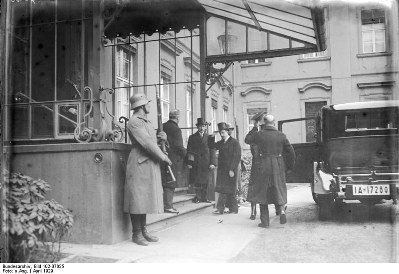 Zar Boris von Bulgarien besucht den Reichspräsidenten von Hindenburg! Zar Boris von Bulgarien (x) begibt sich mit den Herren seiner Gefolgschaft zu einem Höflichkeitsbesuch zum Reichspräsidenten von Hindenburg.